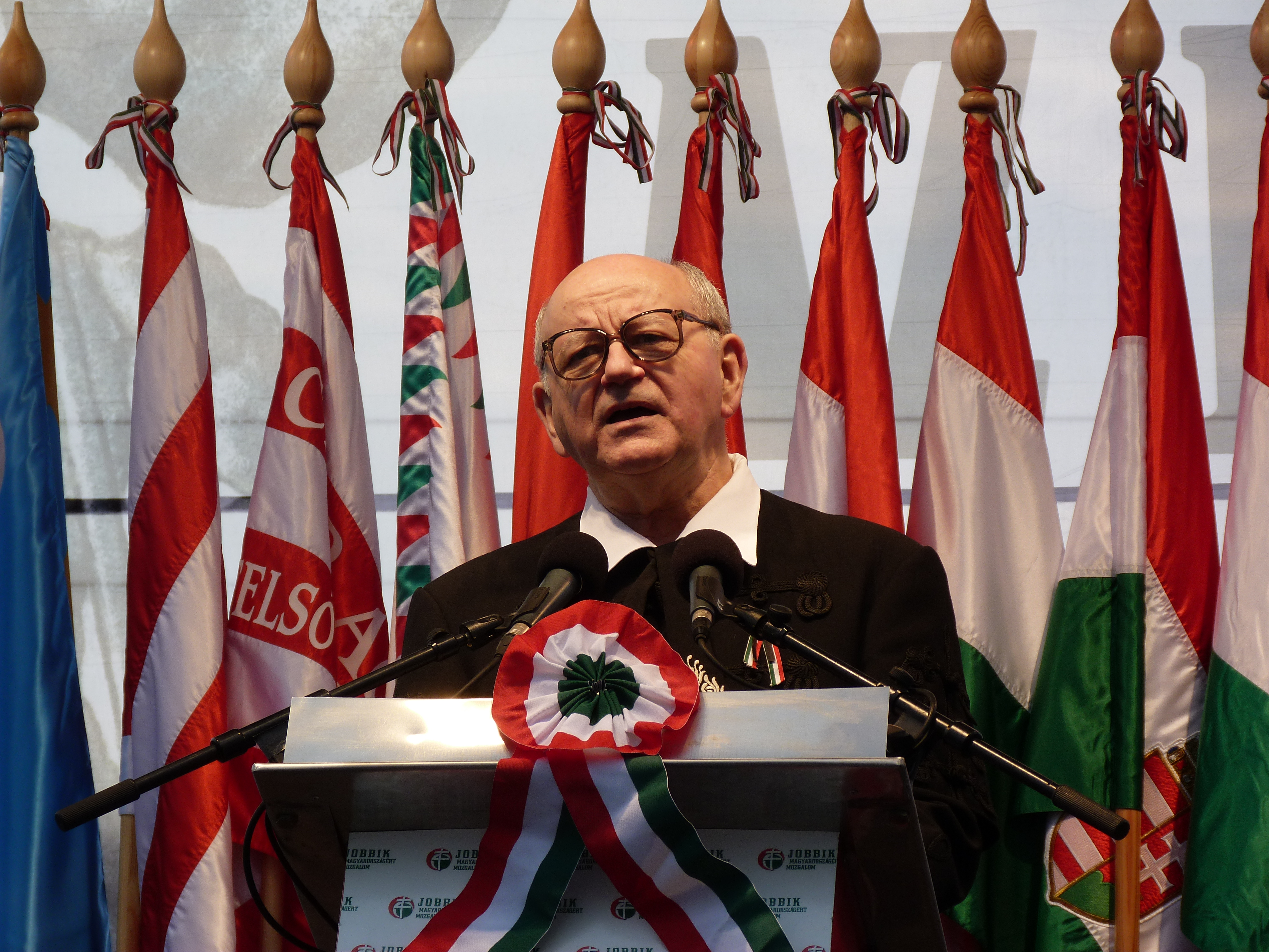 A felvétel 2015. március 15-én készült Budapesten, a Március 15-e téren. Popély Gyula történész, Felvidék. A Jobbik naggyűlése. ©© Derzsi Elekes Andor, Budapest, 2015, A fénykép másolását és felhasználását a szerző ellenérték nélkül, jogutódjaira is kihatóan megengedi. Az engedély kiterjed a kereskedelmi célú hasznosításra is. Kéri azonban nevének feltüntetését a felhasználás során. A Metapolisz sorozat valamennyi képe és filmje Creative Commons alatti. kereskedelmi - for profit - célra is felhasználható. Ajánlott hivatkozás: Derzsi Elekes Andor: Metapolisz DVD line